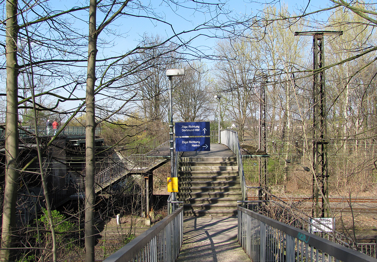 Zugang zu den Bahnsteigen des Bahnhofs Dortmund-Scharnhorst.